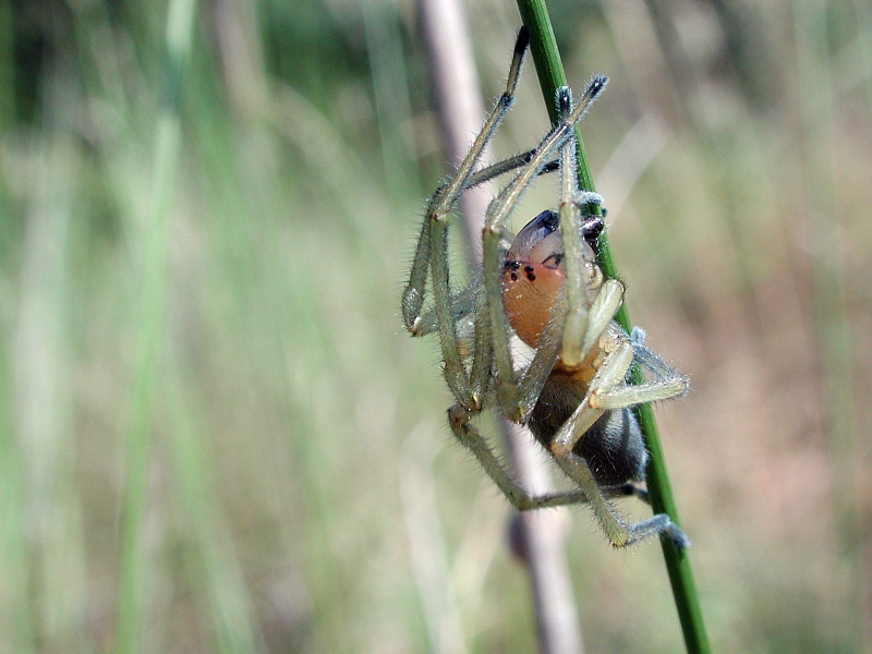 Dornfinger, Cheiracanthium punctorium, Darmstadt, Deutschland (Germany)